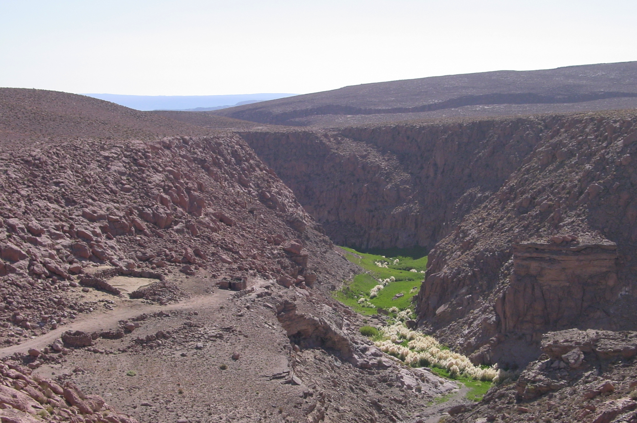 Le Rio Puritama au niveau des "Baños de Puritama ", route B 245, commune de San Pedro de Atacama, province e El Loa, région II, Chili